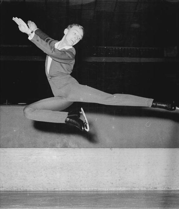 Bodo Bockenauer Zentralbild Sturm 20.1.1961 In wenigen Tagen beginnen die Europameisterschaften im Eiskunstlauf. Der 20-jährige deutsche Meister Bodo Bockenauer verwendet jede Freizeitsunde für seinen geliebten Eislaufsport. Besonders in den letzten Tagen vor den Europameisterschaften im Eiskunstlaufen vom 26. bis 29.1.1961 in Westberlin, trainiert er mit viel Fleiß und Energie auf dem Eisparkett der Werner-Seelenbinder-Halle. UBz: Bodo Bockenauer trainiert für seine Kür zu den Europameisterschaften.